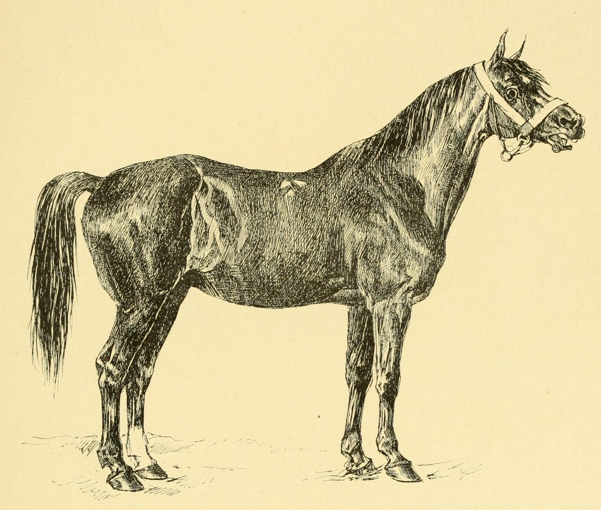 Fenella, jument de la race de Selle Rostopchine Les races chevalines : avec une étude spéciale sur les chevaux russes /